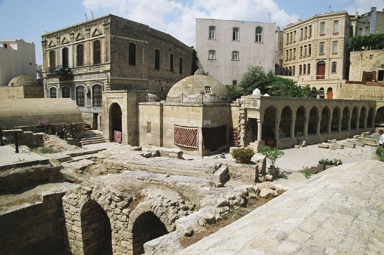 Baku, Azerbaiginan